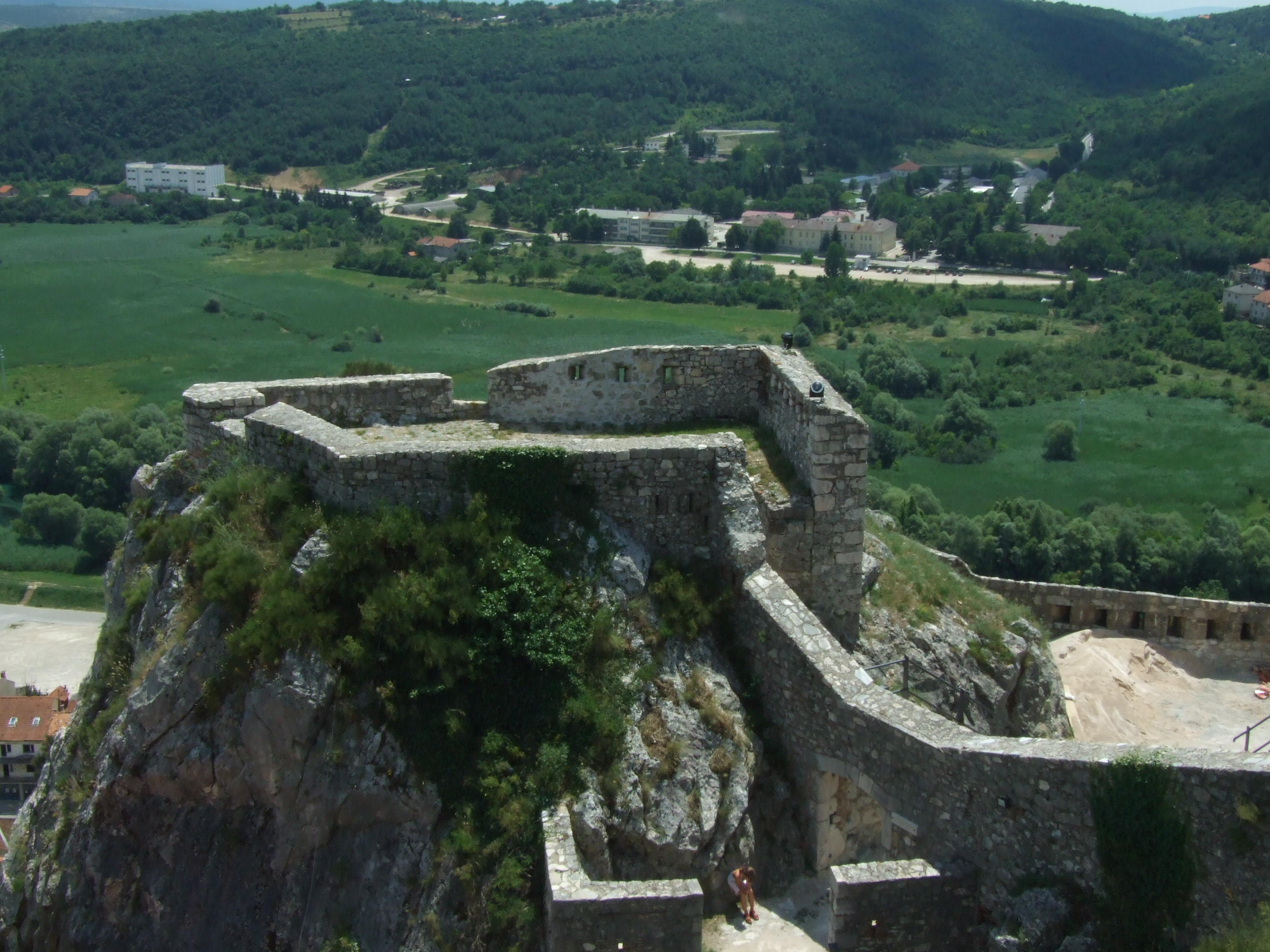 Kninska tvrđava u gradu Kninu. Na fotografiji je jedna od kula. Fotografirano 3. srpnja 2010.